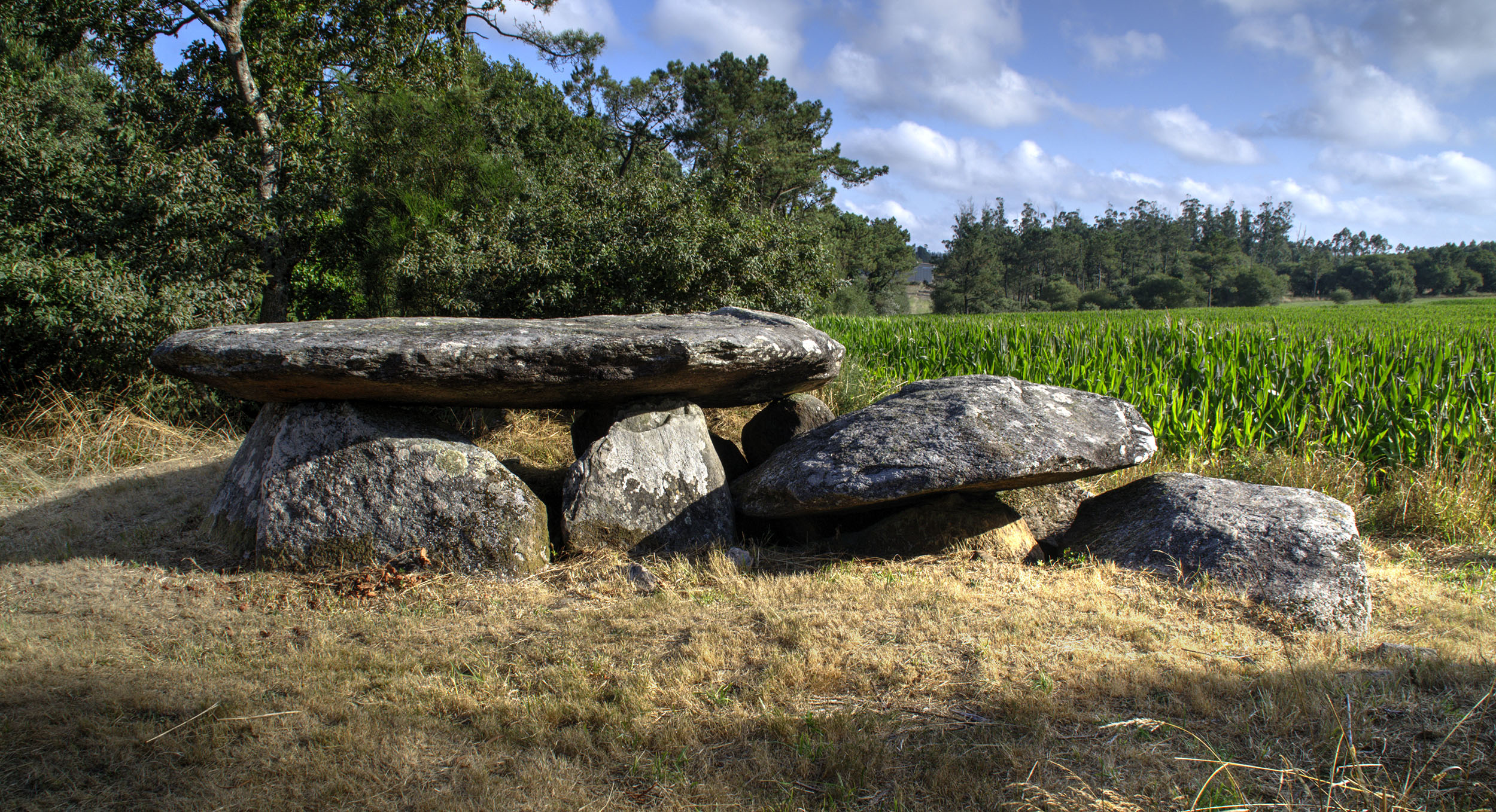 Este dolmen se encuentra en Regoelle, en el conejo de Vimianzo, A Coruña. También, como no, se le conoce como Casa dos Mouros. Mide unos 7.5 m de longitud y conserva tanto la cámara (con seis ortostatos) como el corredor, ambos cubiertos con losas. Sigue parcialmente cubierto por el túmulo.